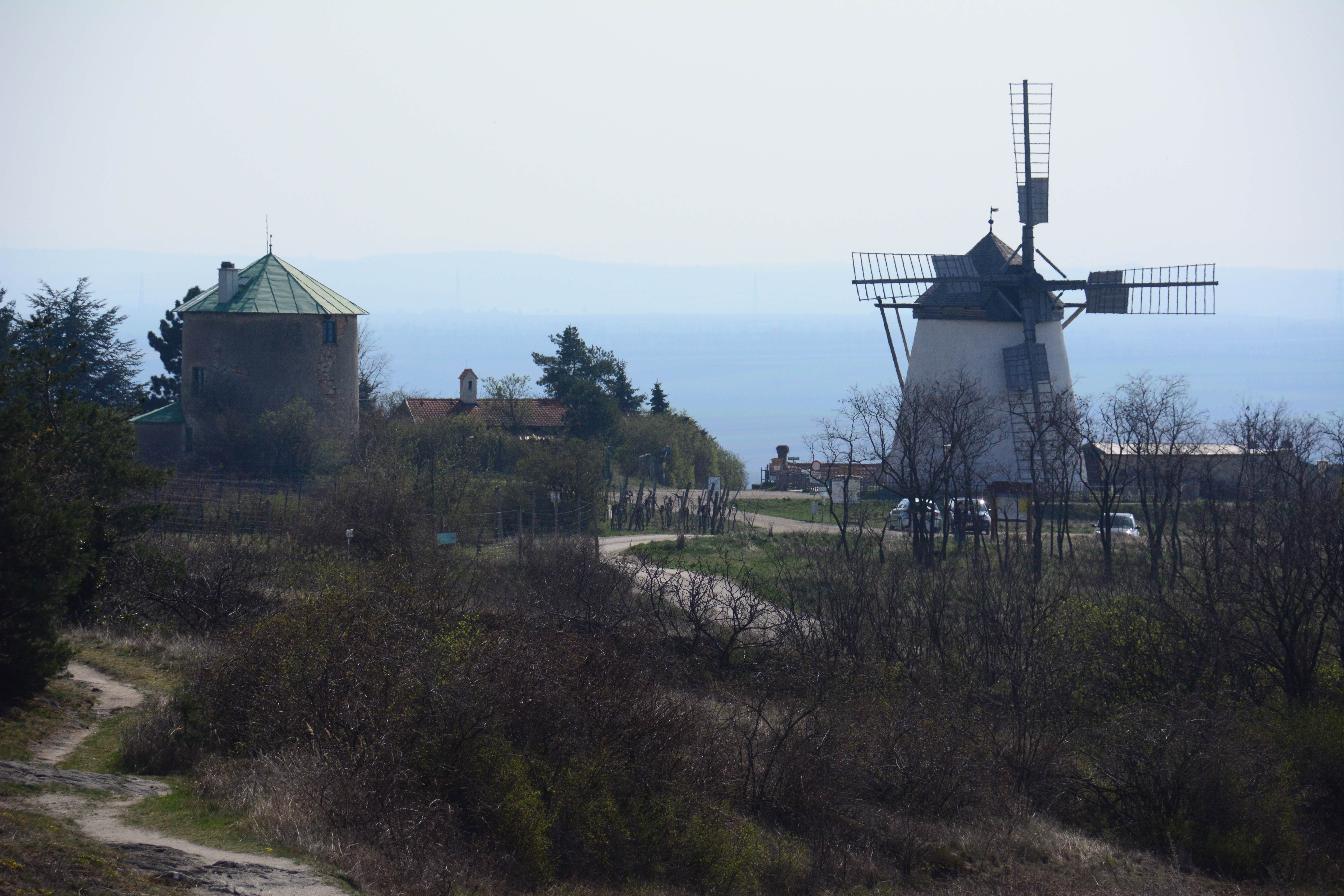 Windmühle